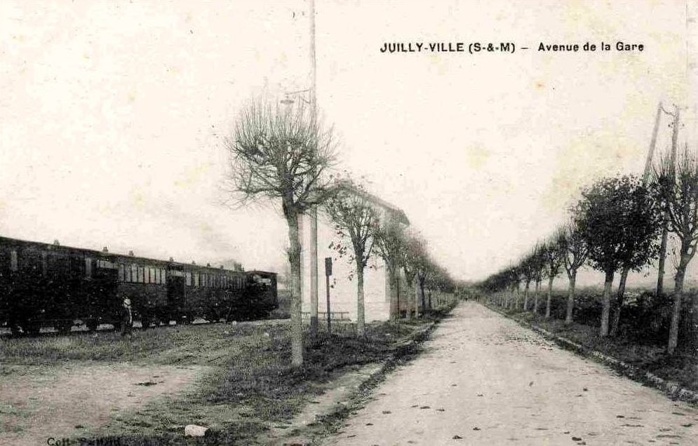 Train de voyageurs du tramway de Meaux à Dammartin en gare de Juilly (village).